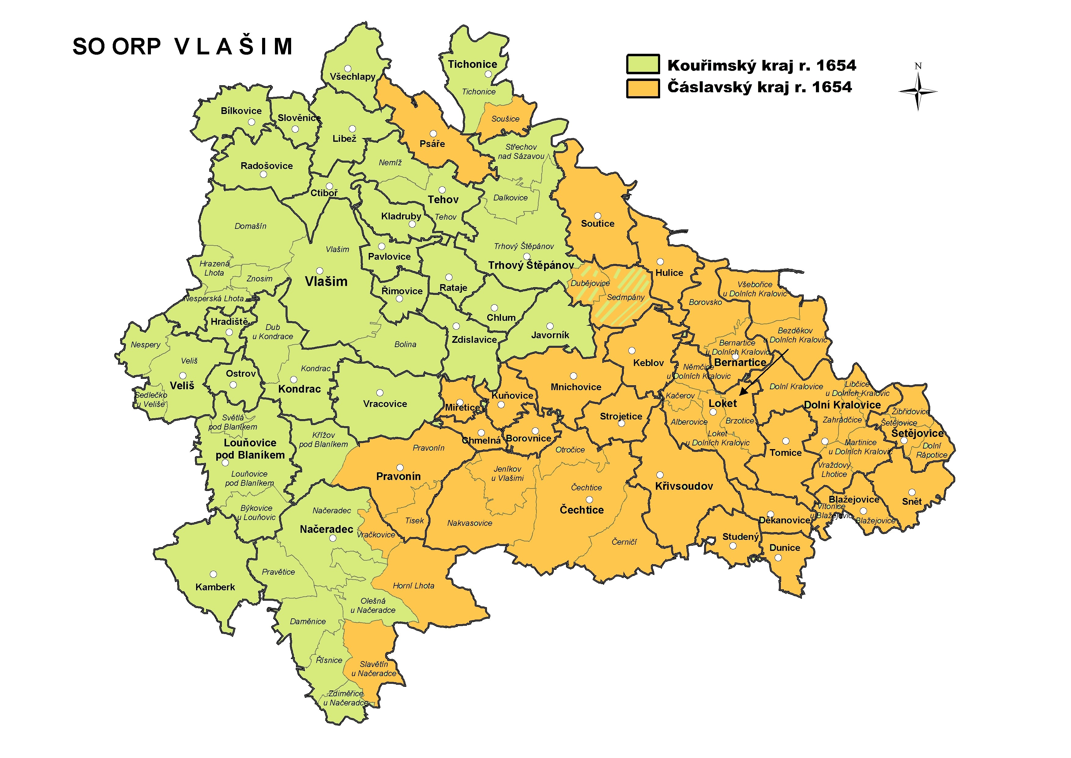 Čáslavský kraj r. 1654 v dnešním okrese Benešov